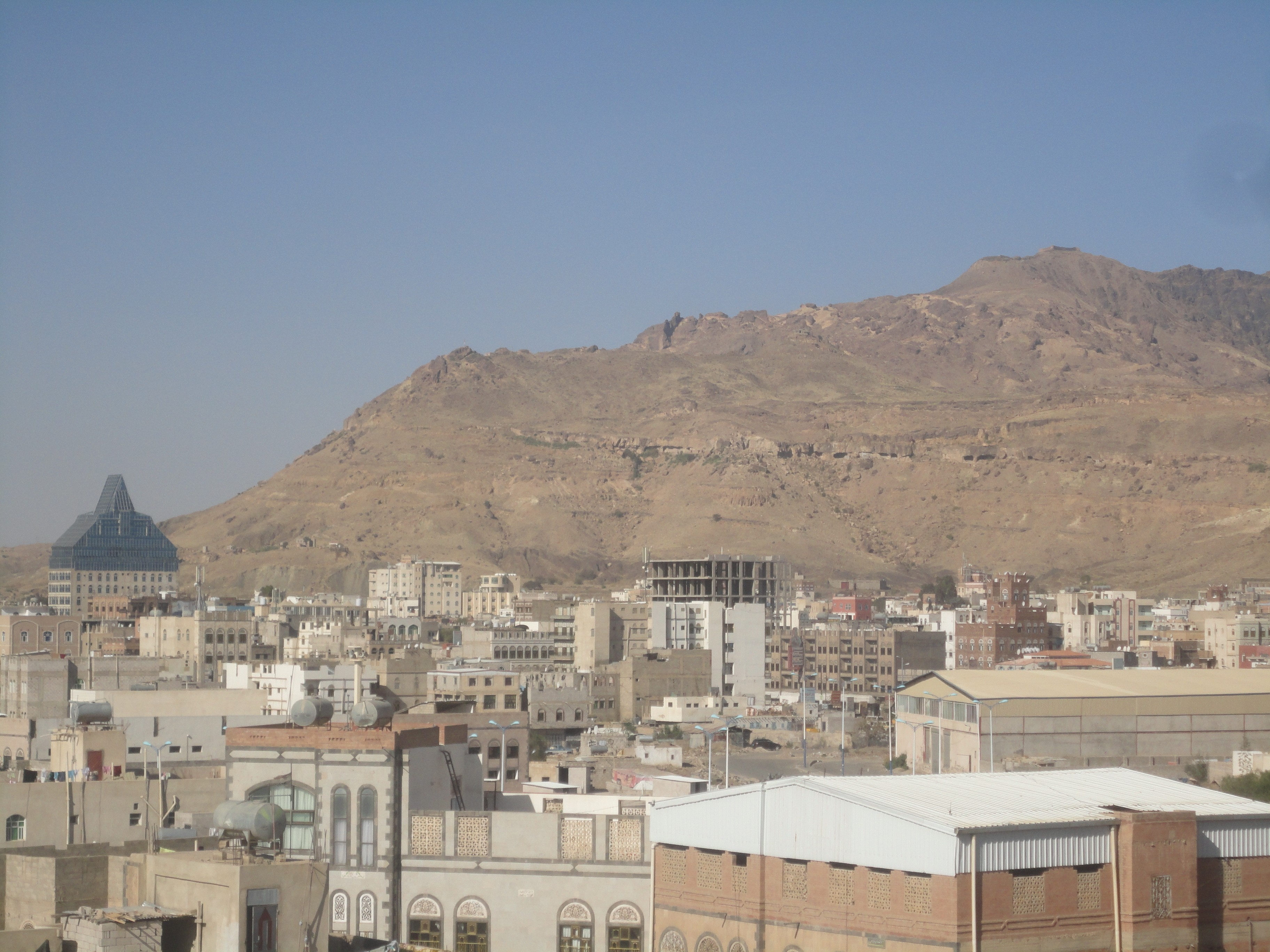 جبل نقم